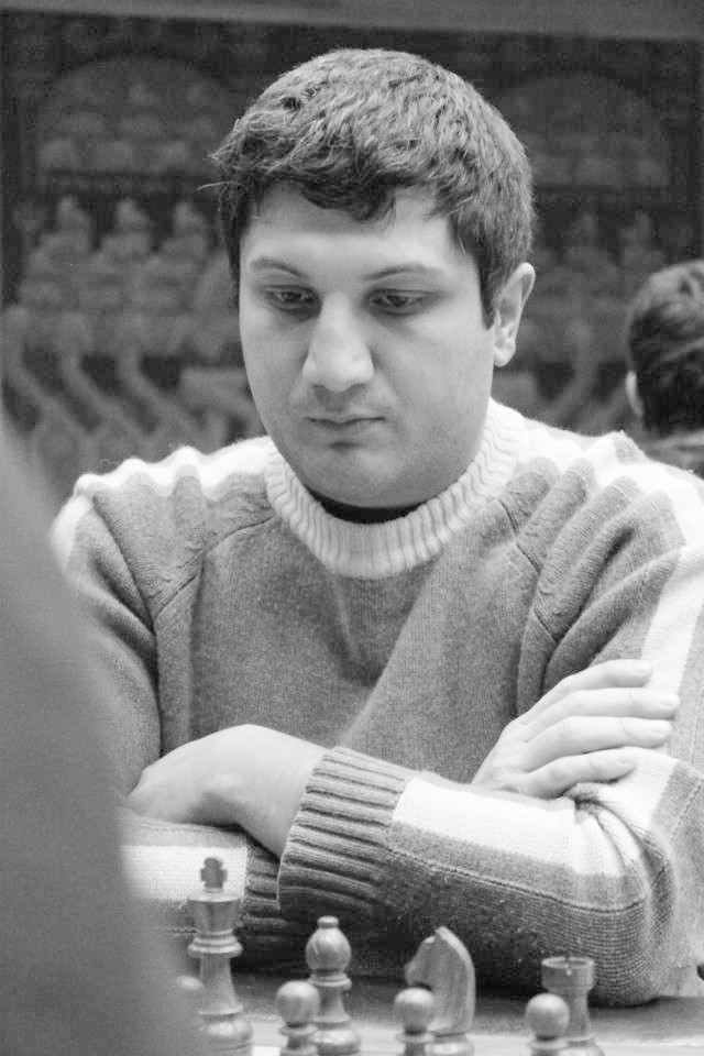 Тигран Котанджян